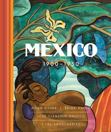 Portada del Catalogo de la Exposición México 1900 - 1950 en el Museo de Dallas, editado por Ediciones El Viso México